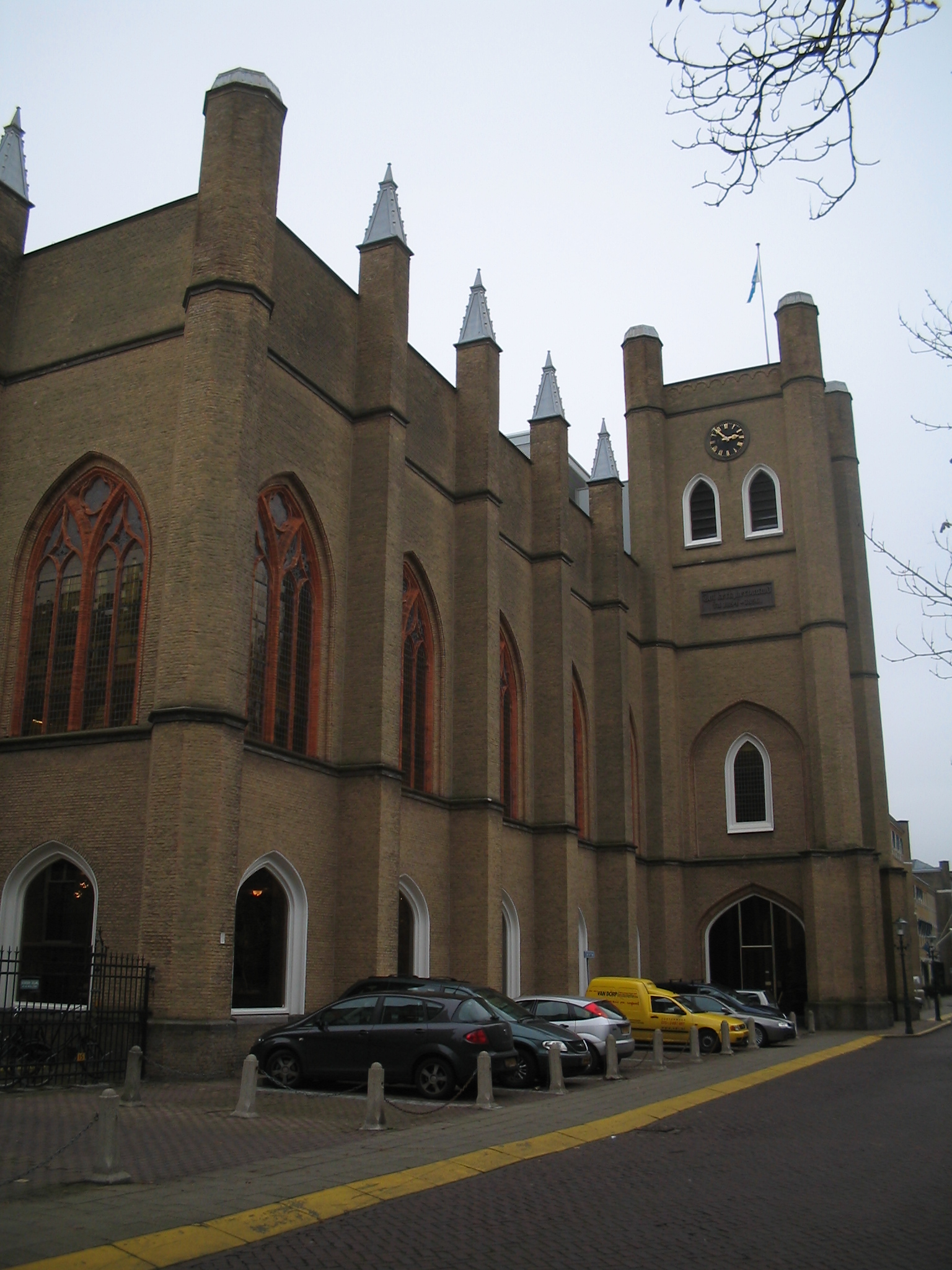 Den Haag Willemshof